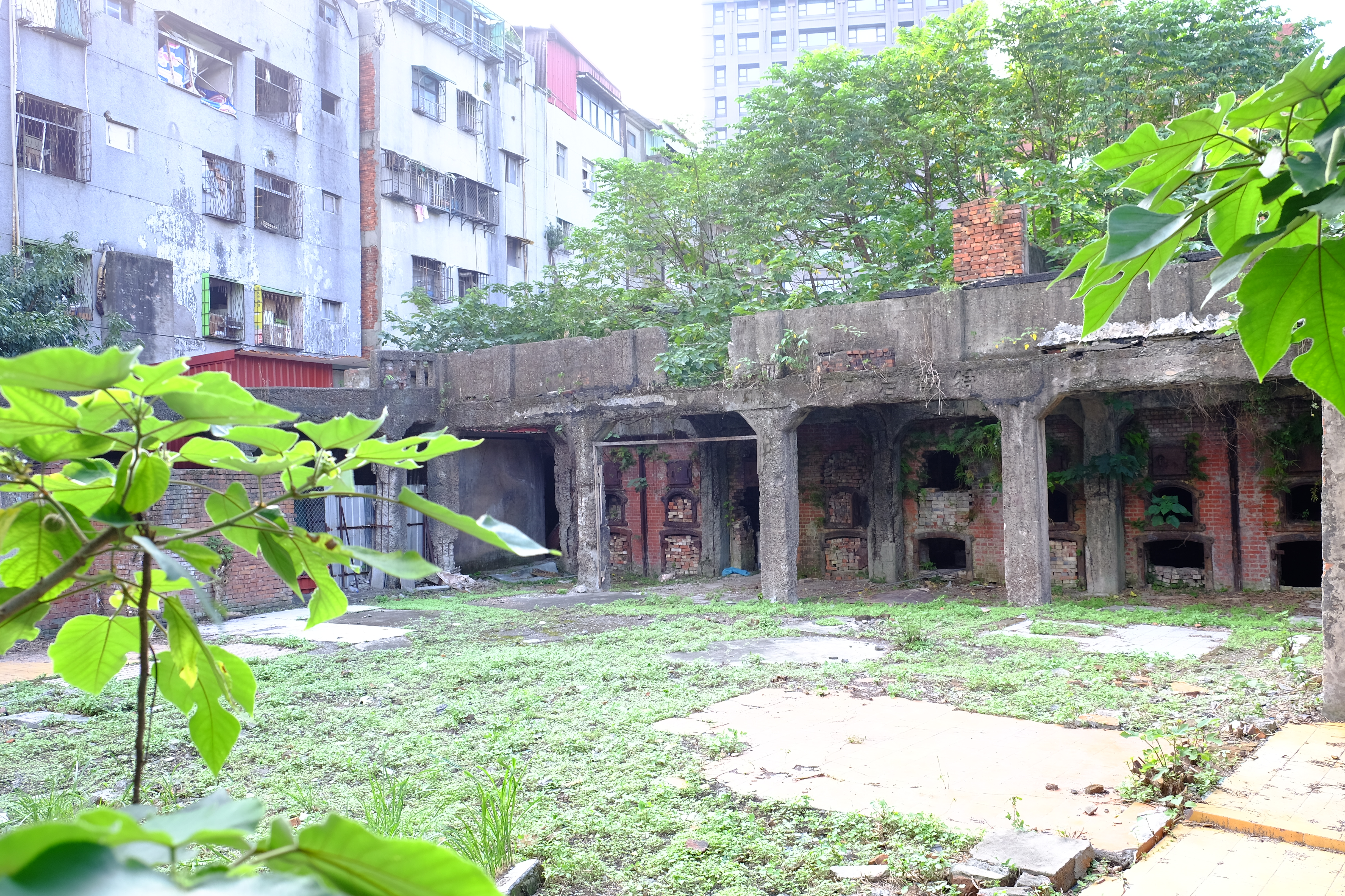 2016龍口町塵芥燒卻場